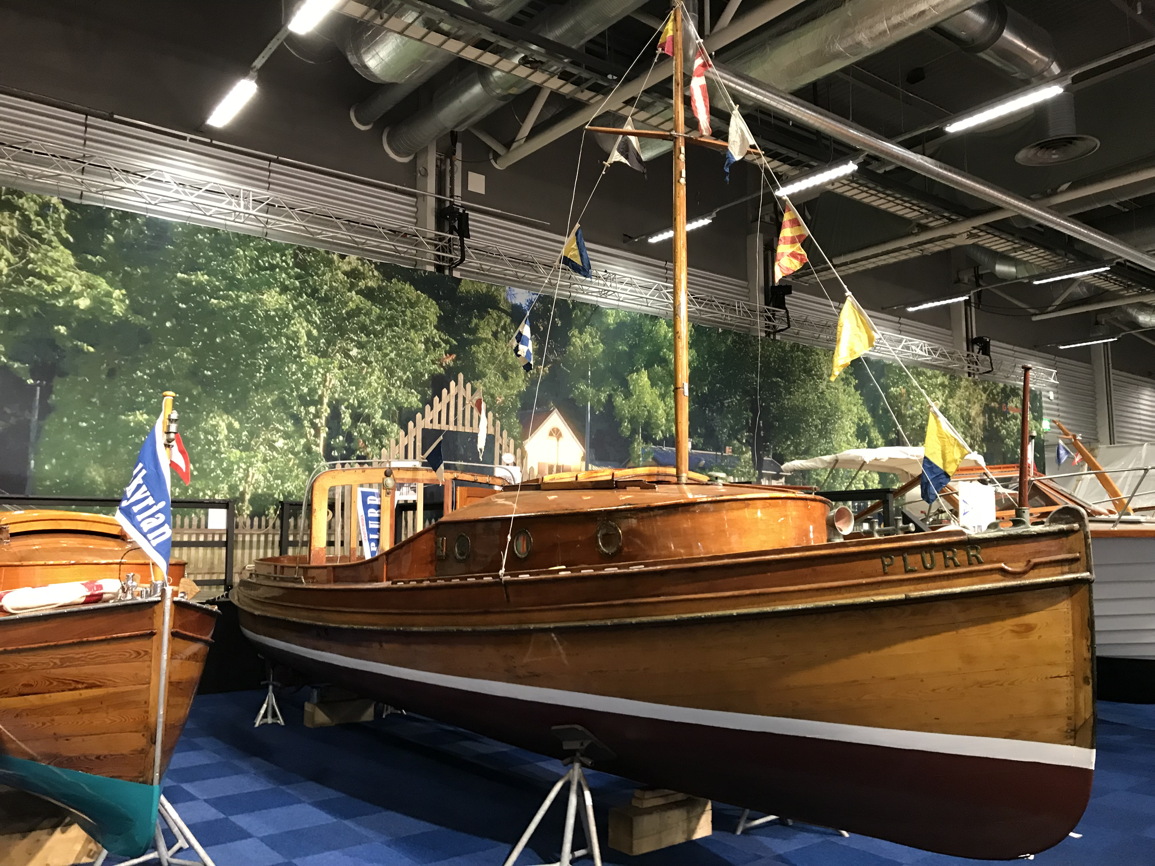 Petterssonbåten M/Y Plurr från 1905 i 100-jubilerande Heleneborgs båtklubbs monter på båtmässan Allt för sjön i Stockholm, 1-10 mars 2019.